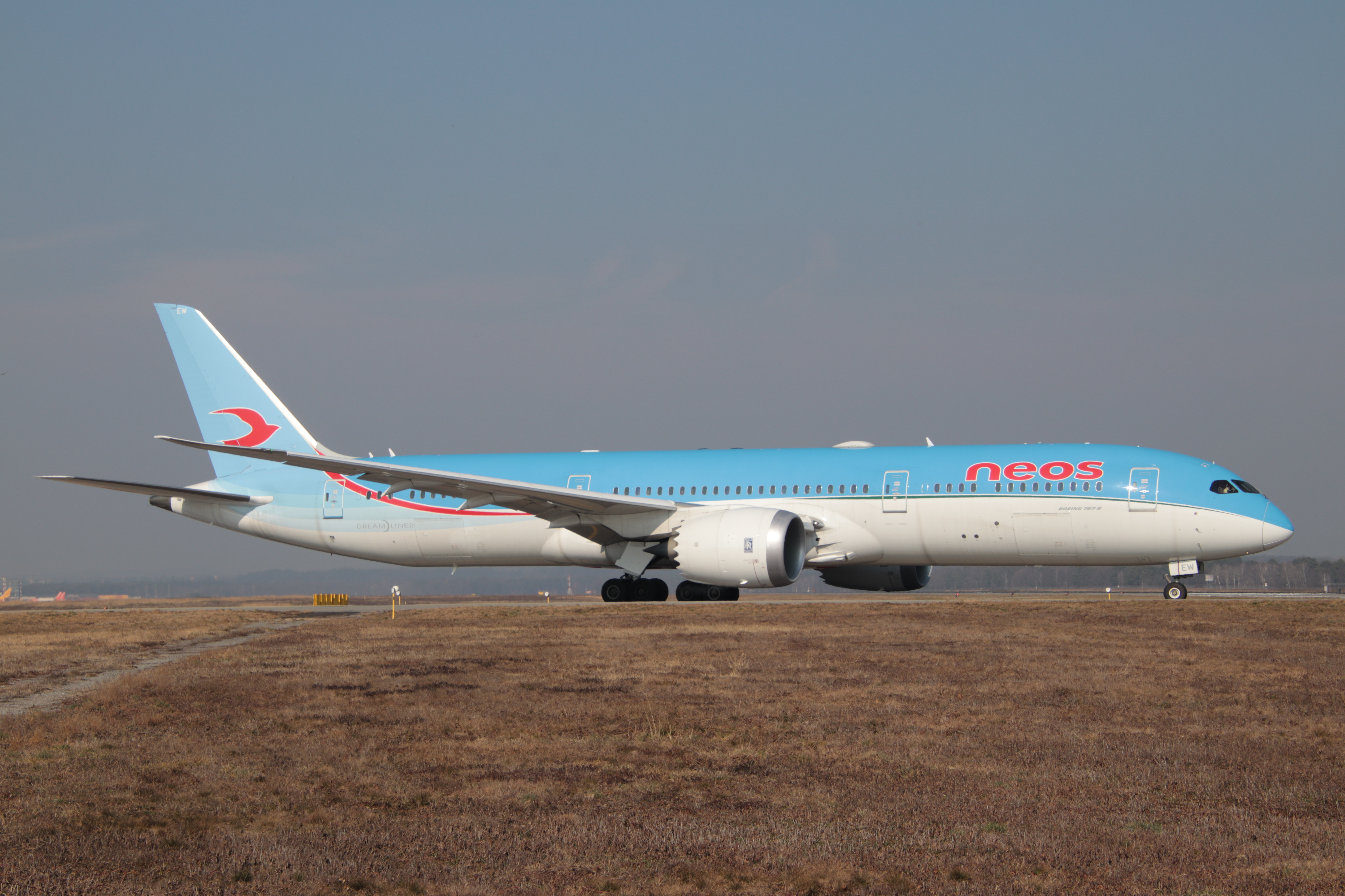 NEOS AIR B789